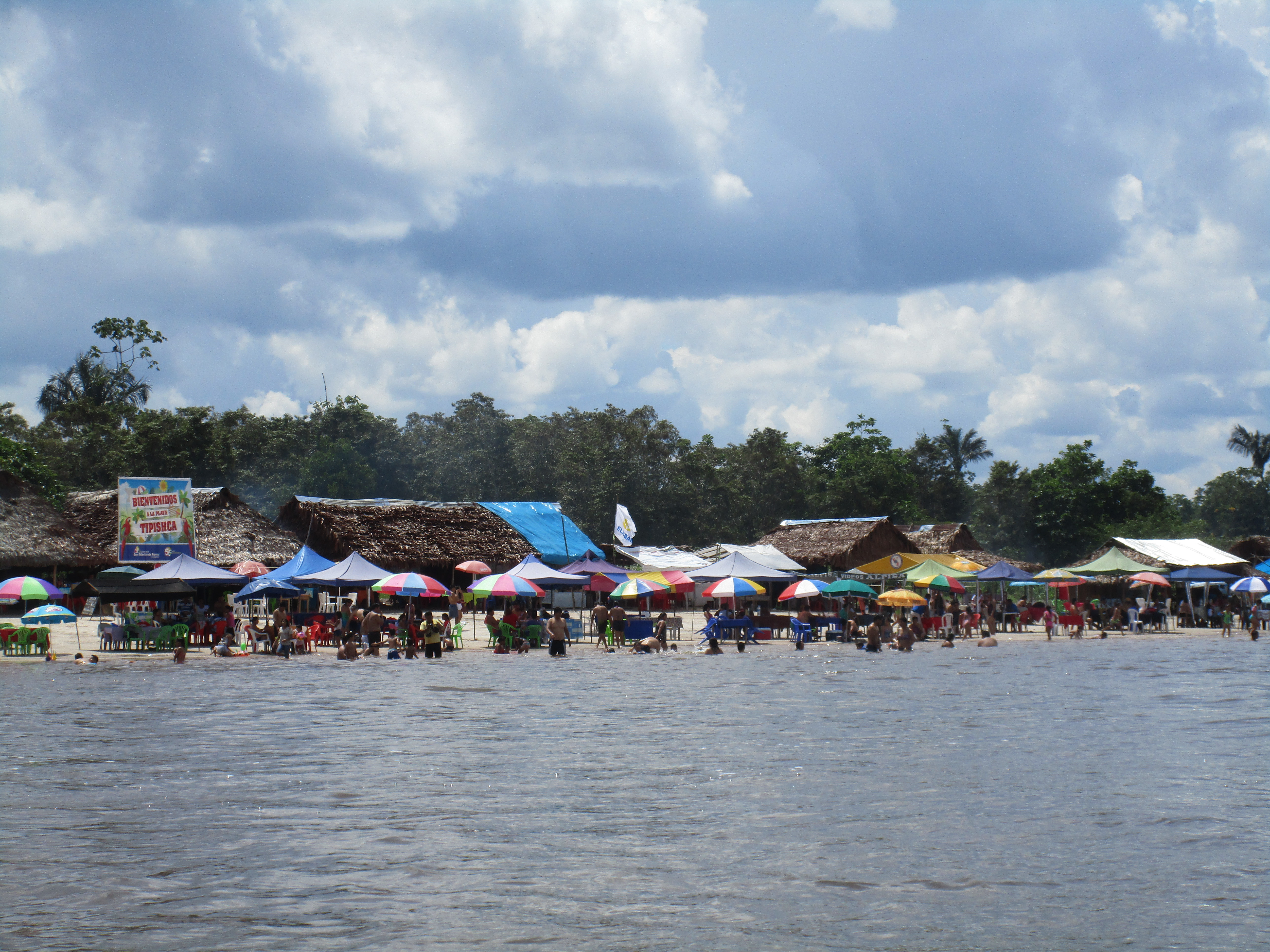 Playa de Tipishca (Iquitos) en el río Nanay.